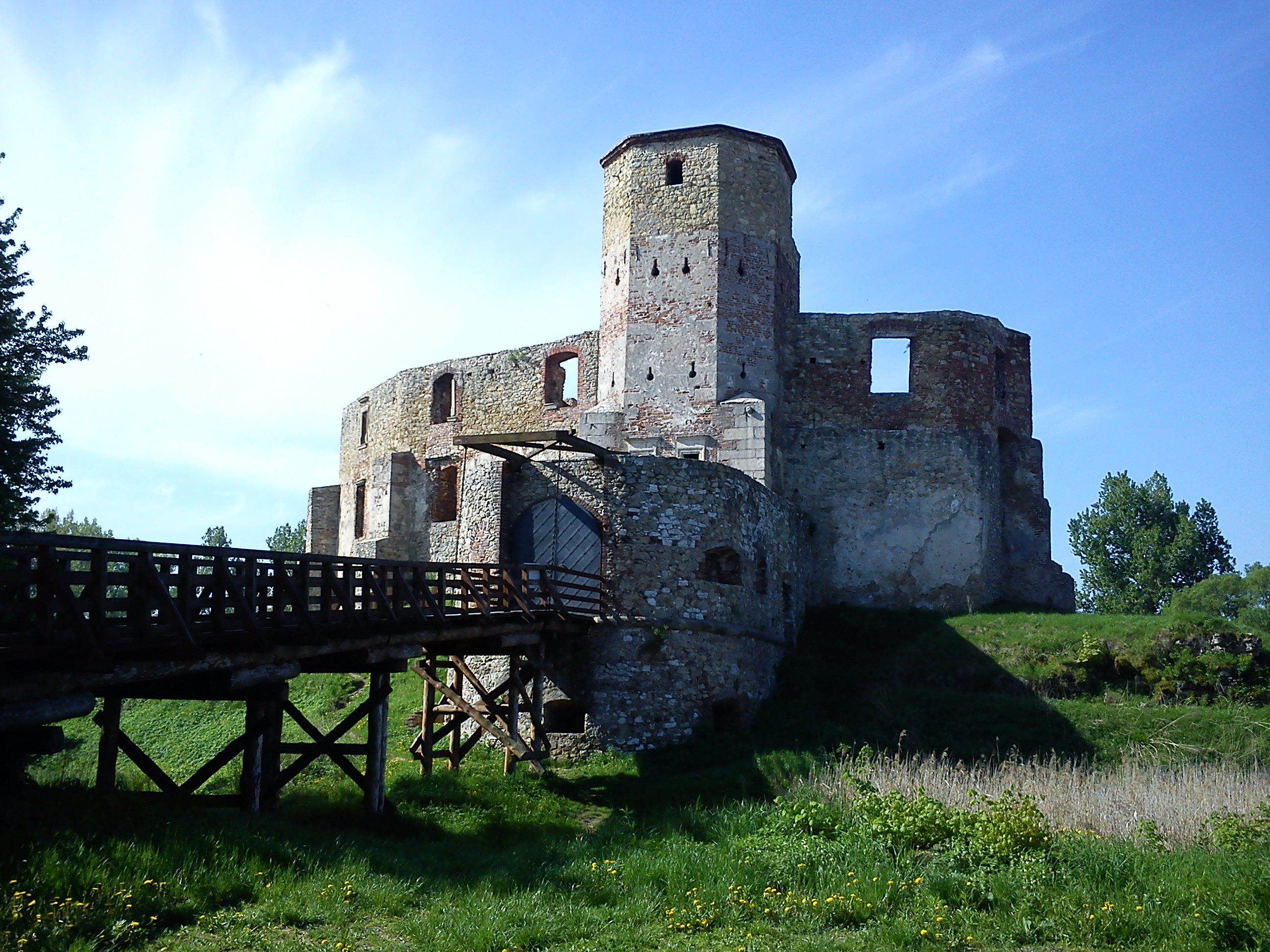 Siewierz, ruiny zamku, XIV, XVI-XVIII